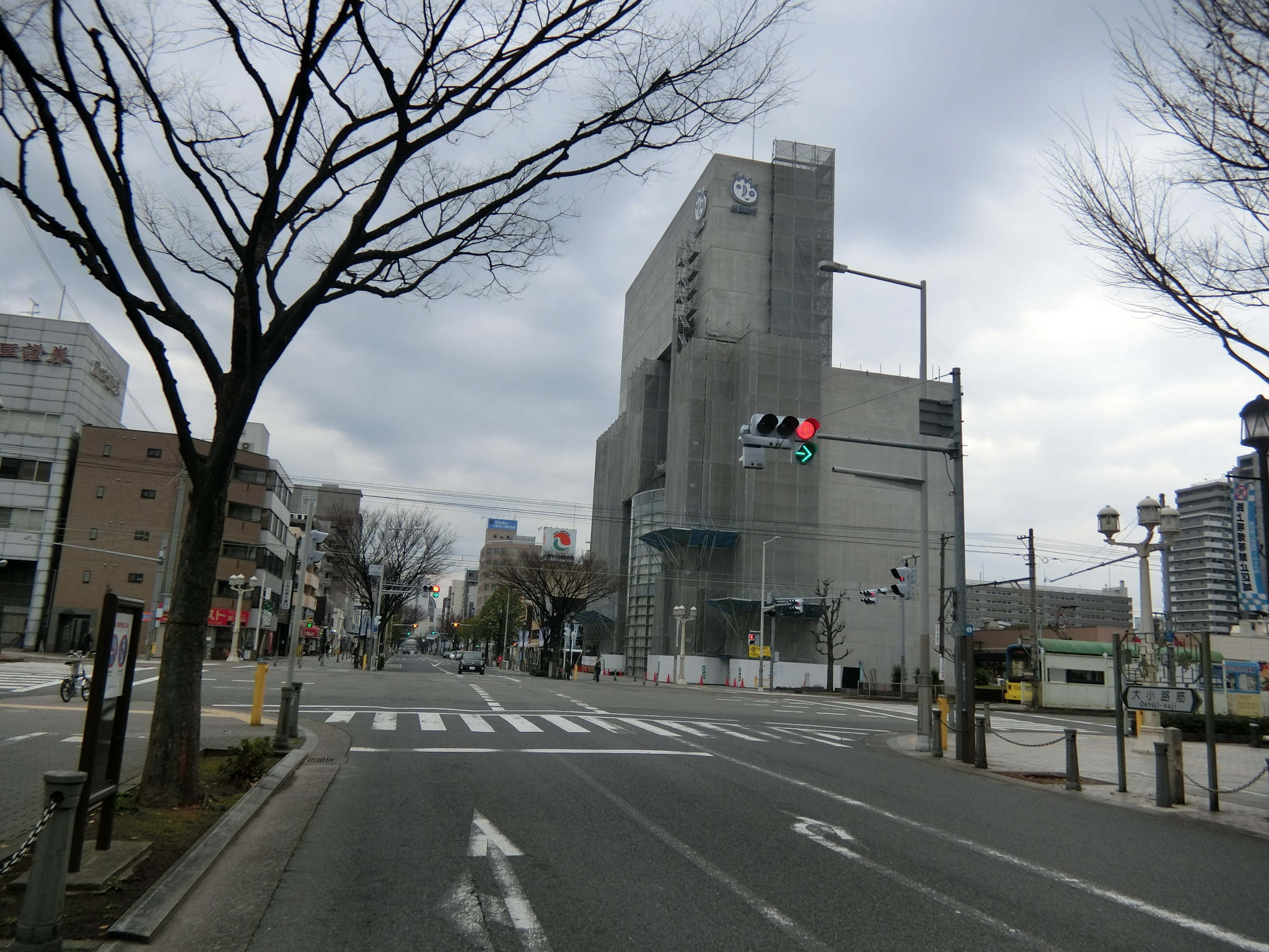 大小路と紀州街道の交差点（堺市堺区） 西側より撮影